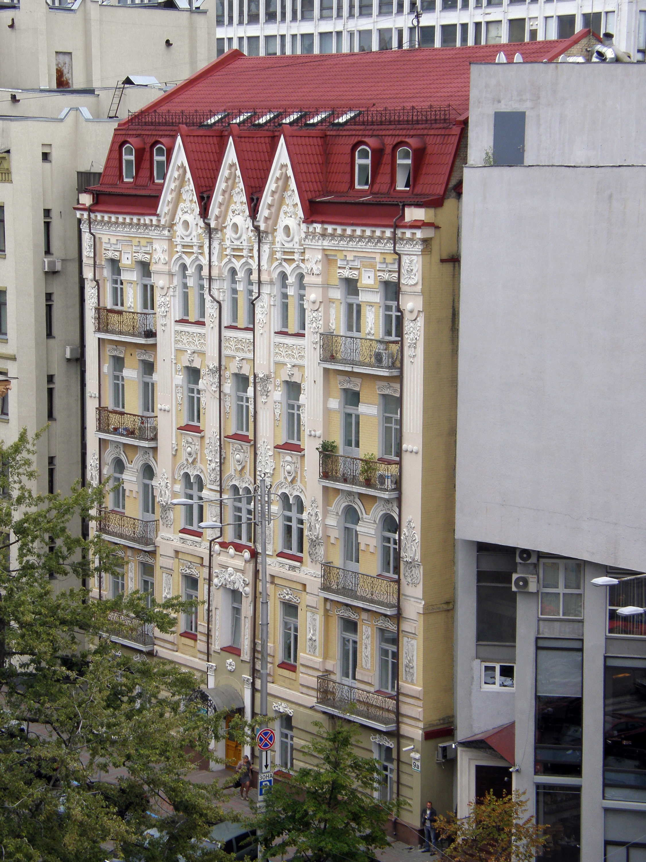 улица Шота Руставели, 9а